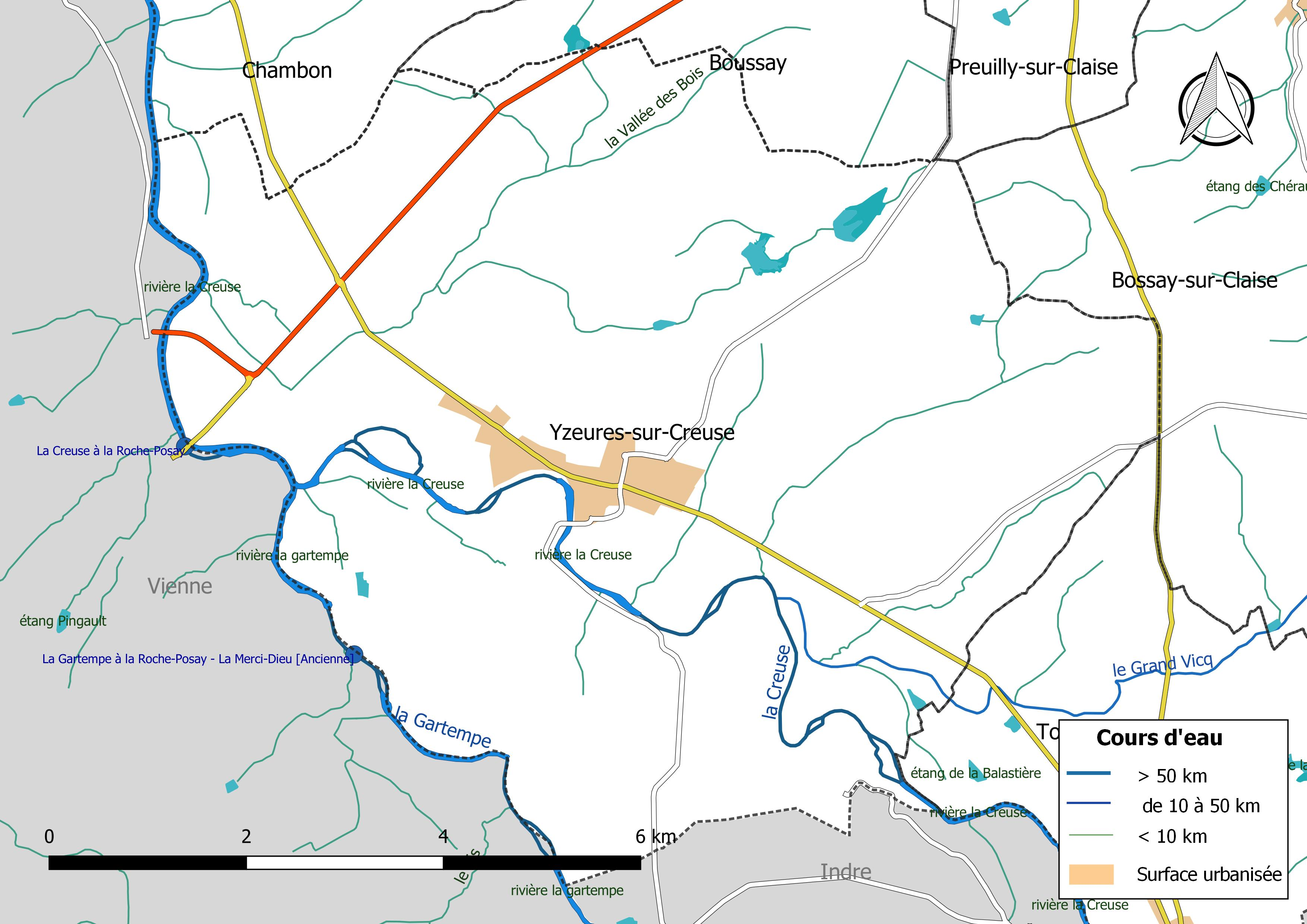 Carte du réseau hydrographique de la commune de Yzeures-sur-Creuse (France).